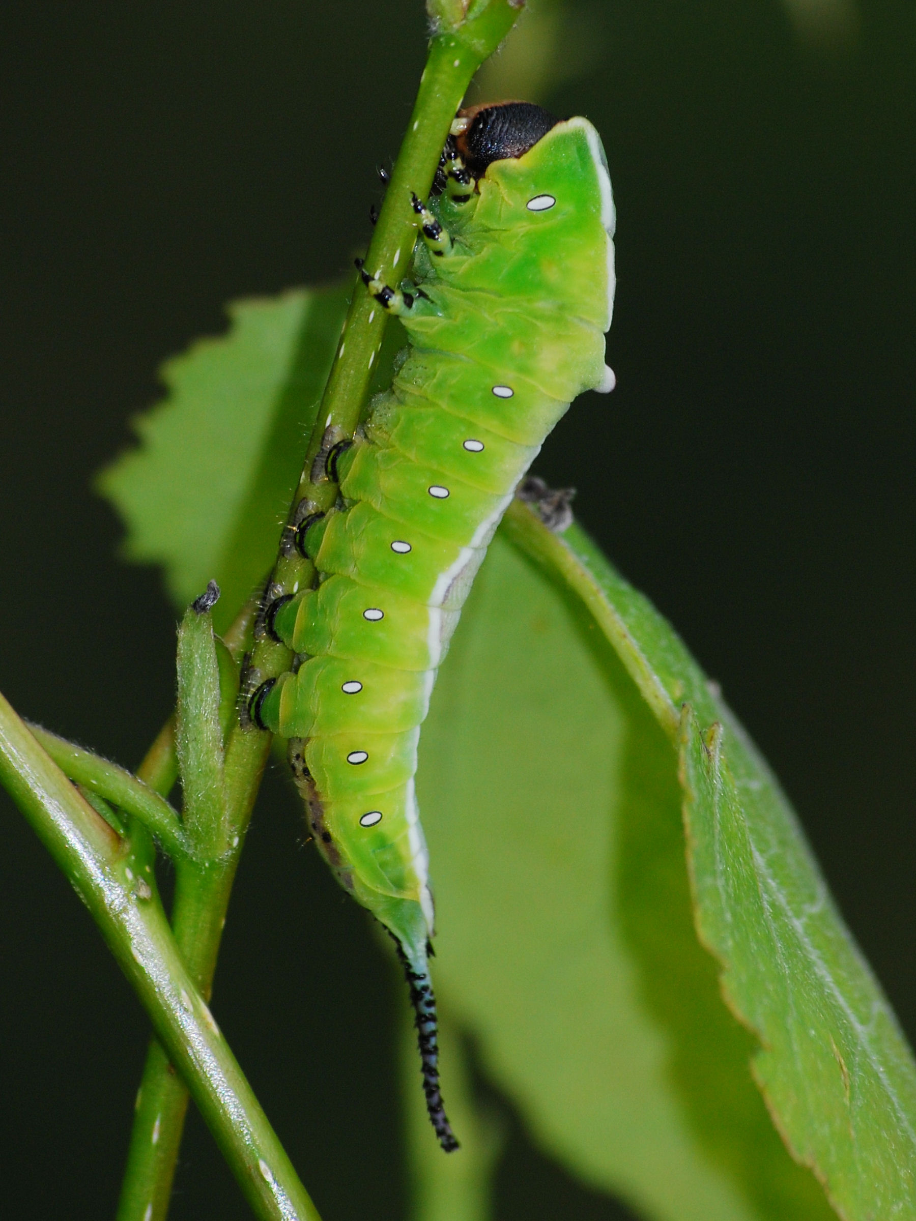 Cerura vinula, Widłogonka siwica, Puss Moth